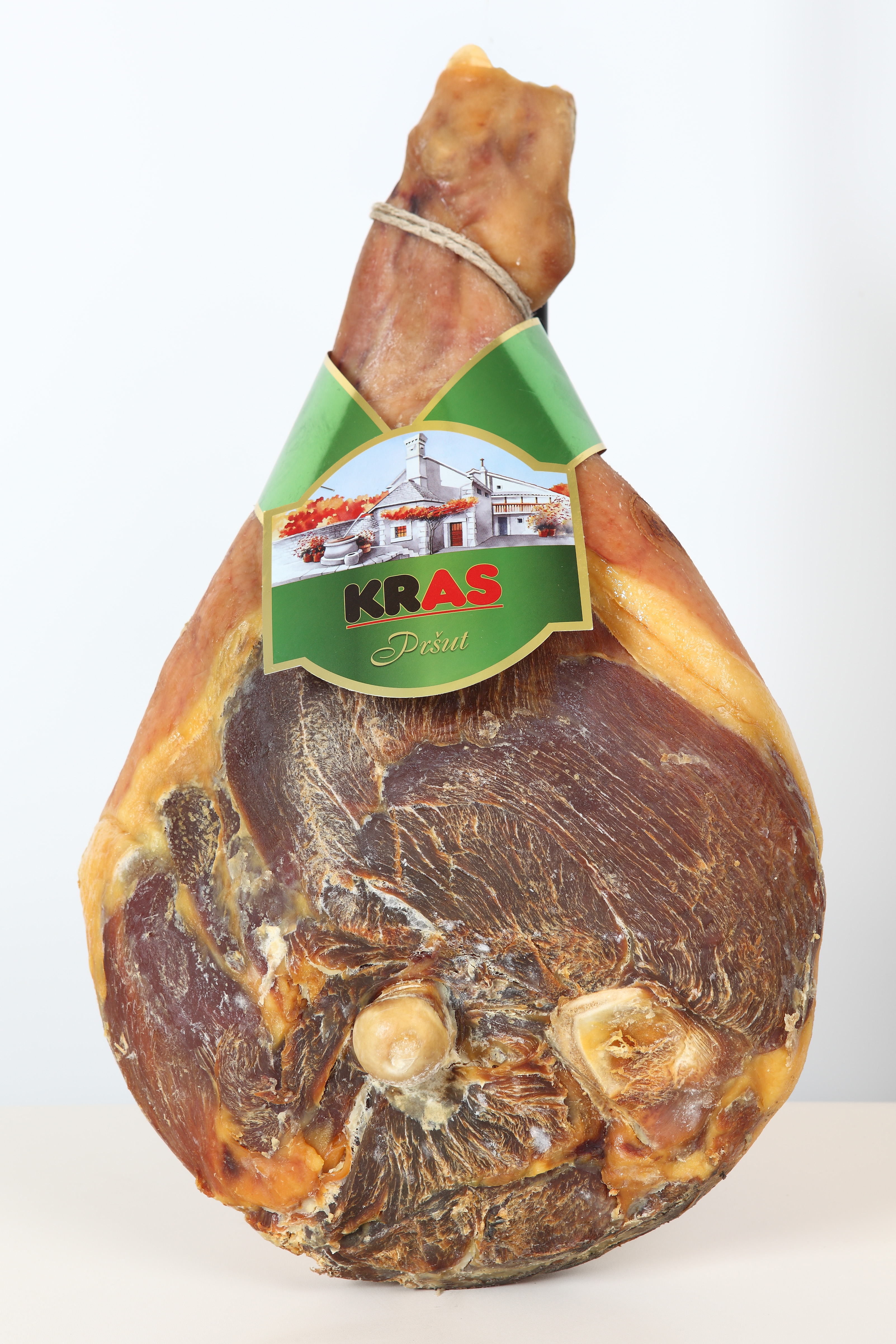 Pršut Kras